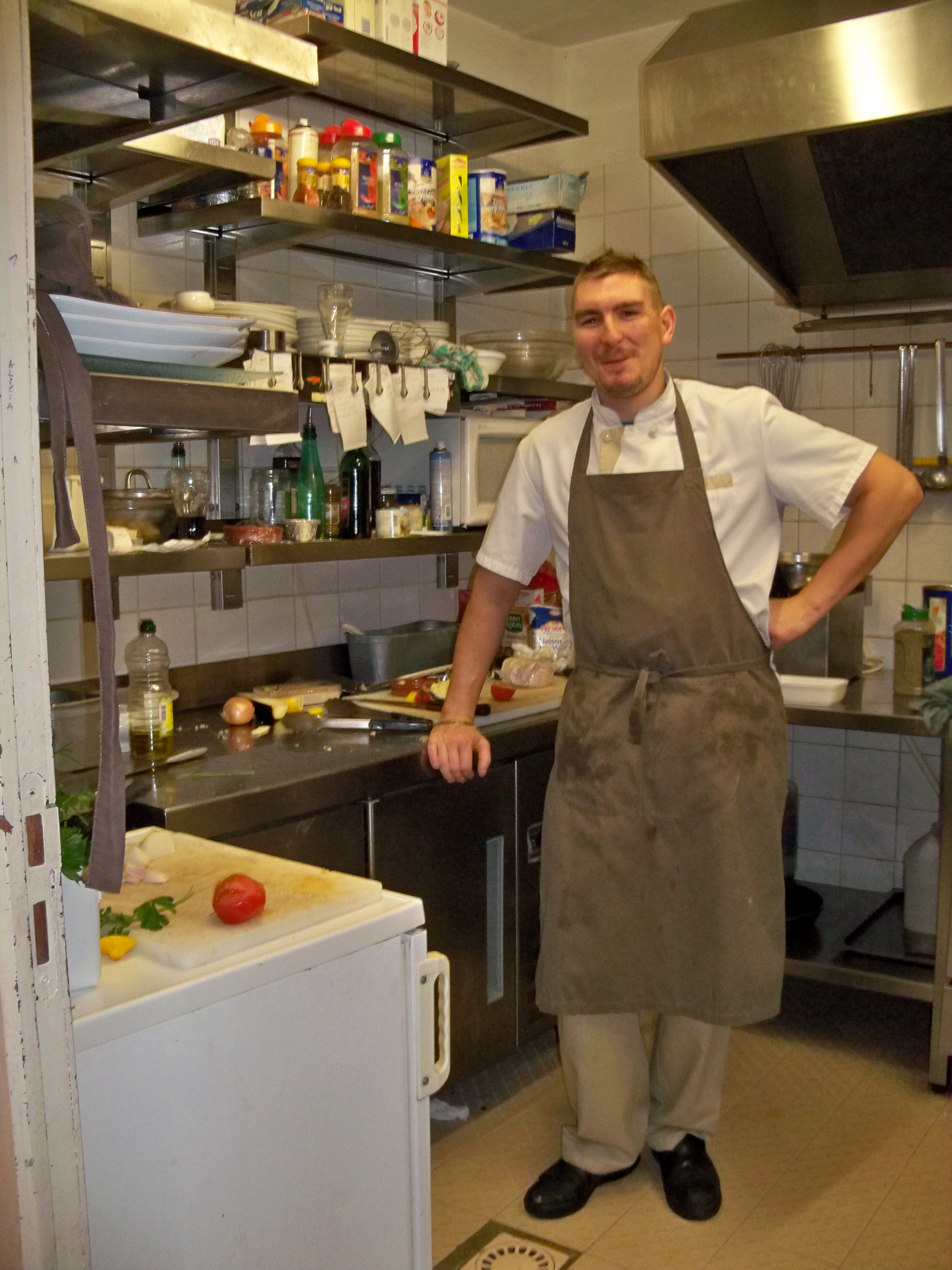 Cuisinier en service (Anthony Morice du "Chat qui pêche" à Apt)